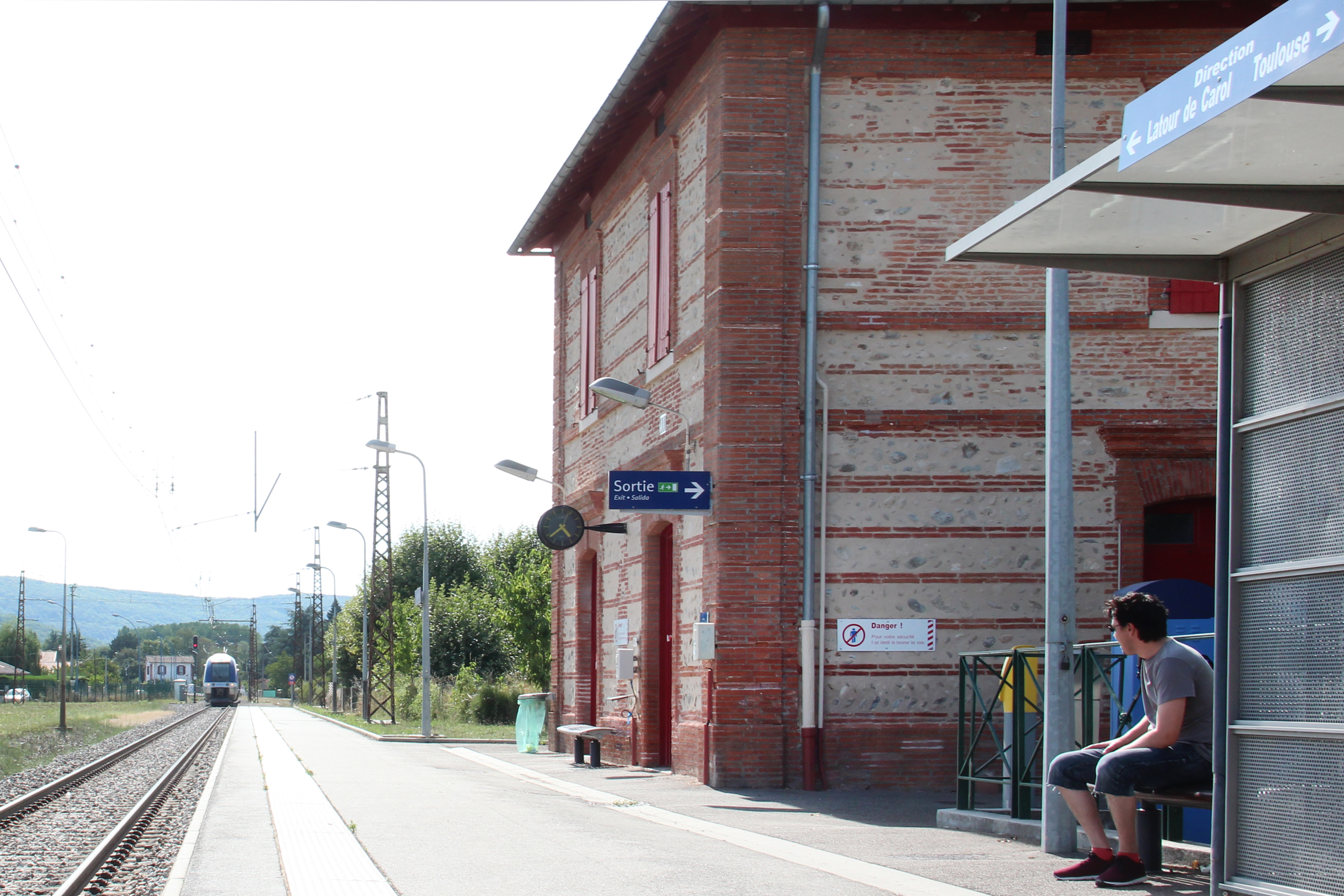 Gare SNCF de Varilhes (Ariège, France).